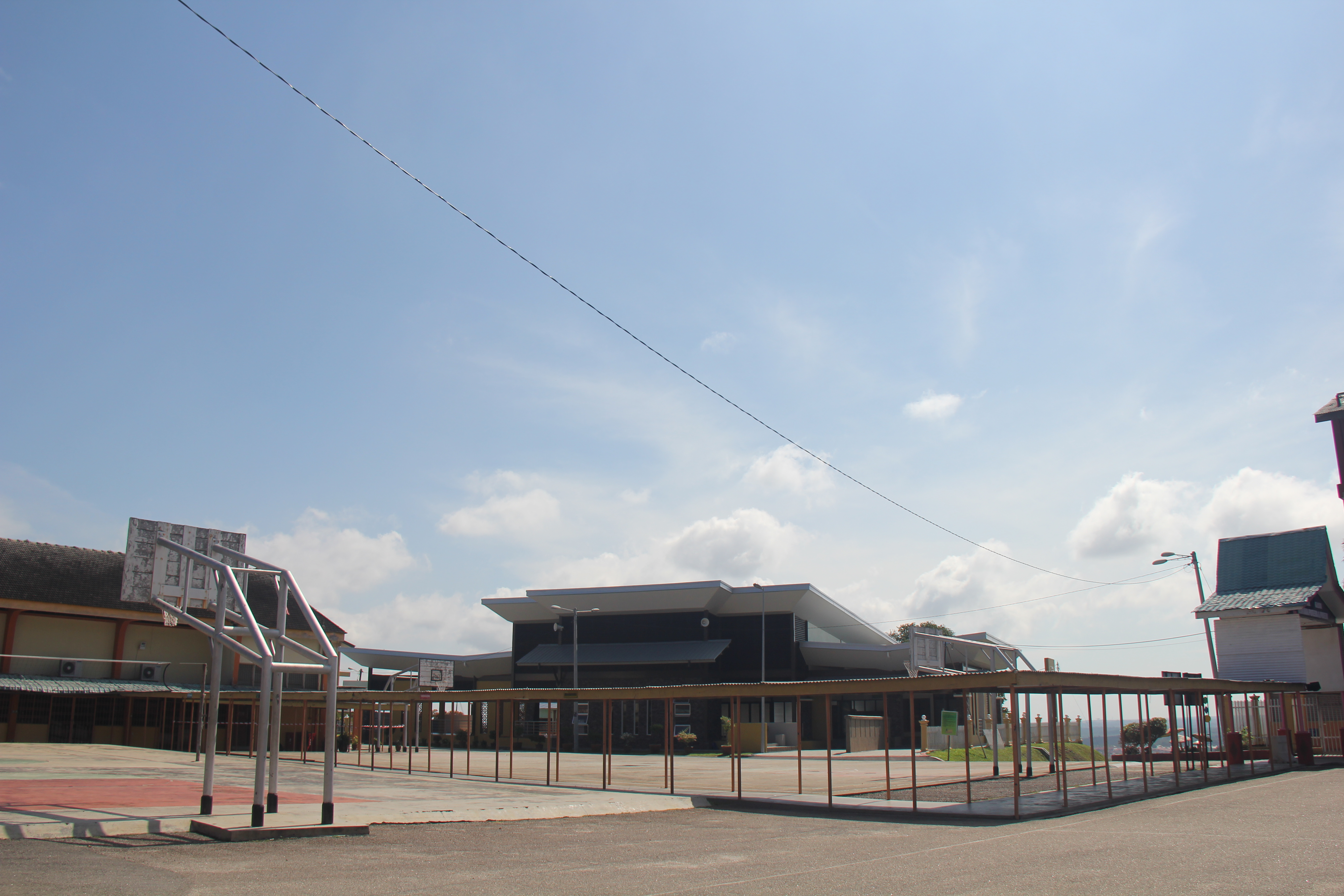 Copyright Protected Taken by Syaddad Nabil Shamsullah Victorious 1317